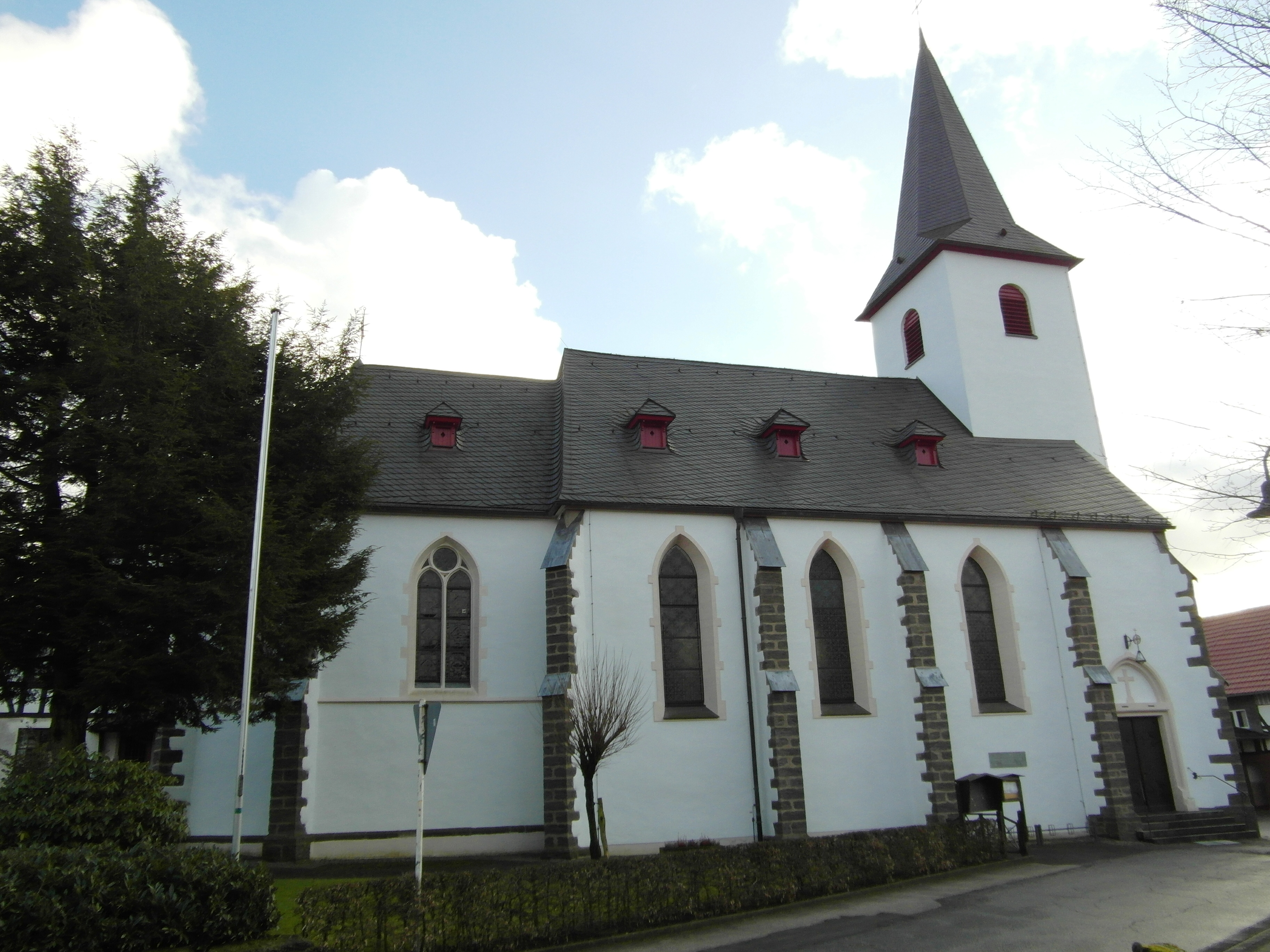 St. Johannes Baptist in Finnentrop- Serkenrode, erbaut 1901